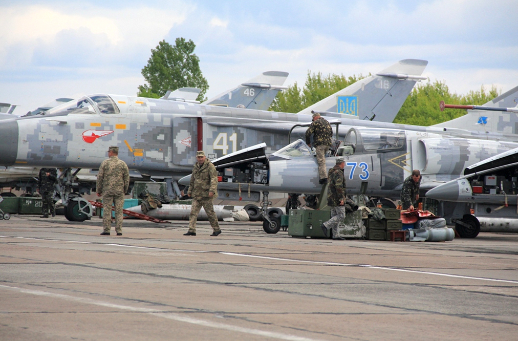 У період із 14 квітня до 3 червня 2016 у Волинській області, на базі військового аеродрому тривав льотно-методичний збір льотного складу бомбардувальної та розвідувальної авіації Повітряних Сил Збройних Сил України. Керівник зборів — льотчик 1-го класу генерал-майор Олексій Котов.